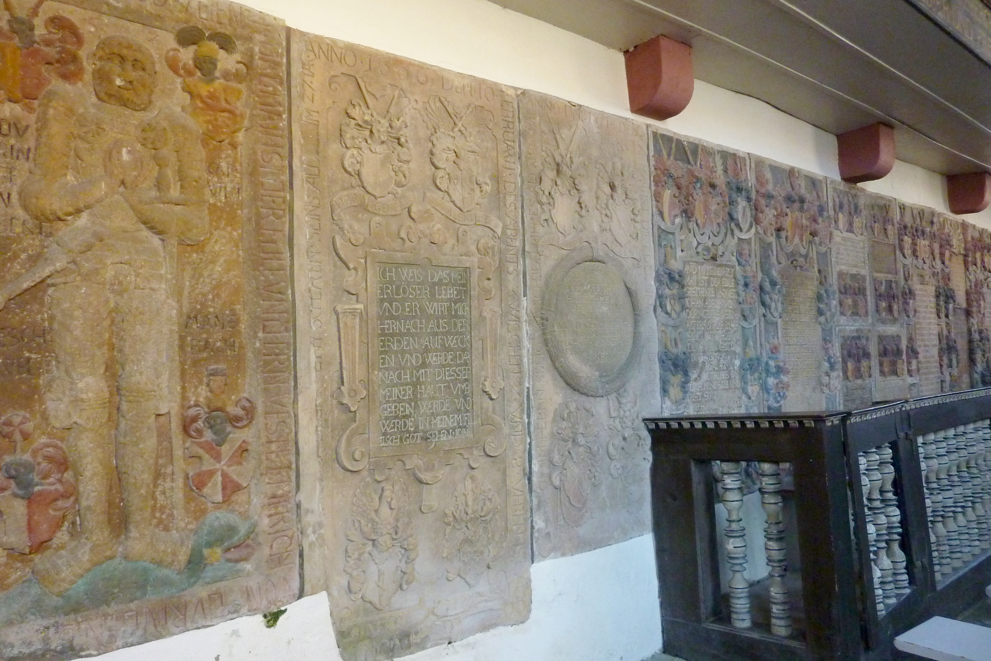 Burg Herzberg in der Gemeinde Breitenbach am Herzberg im Landkreis Hersfeld-Rotenburg (Hessen), Epitaphien in der Burgkapelle